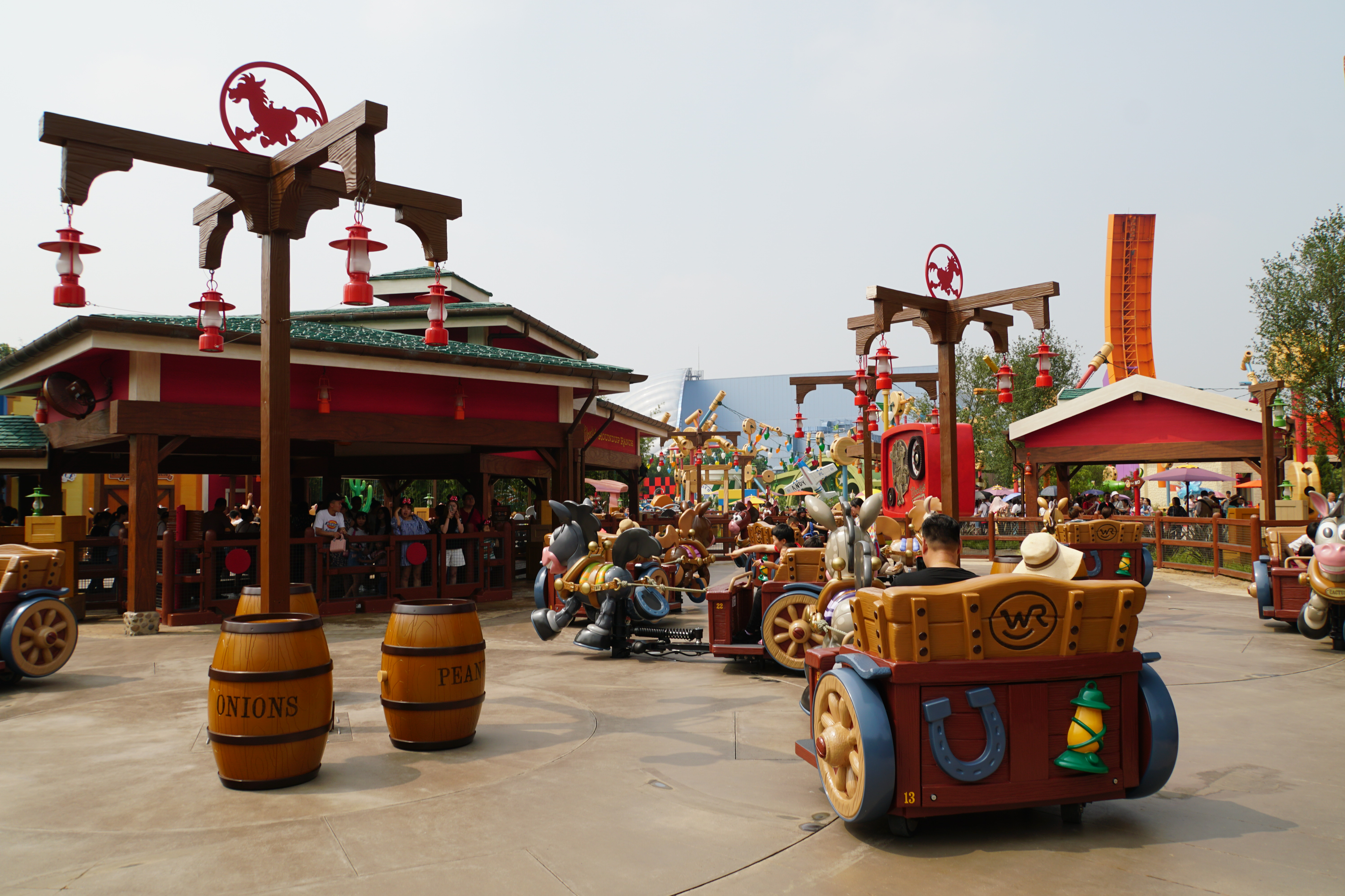 上海迪士尼乐园胡迪牛仔嘉年华